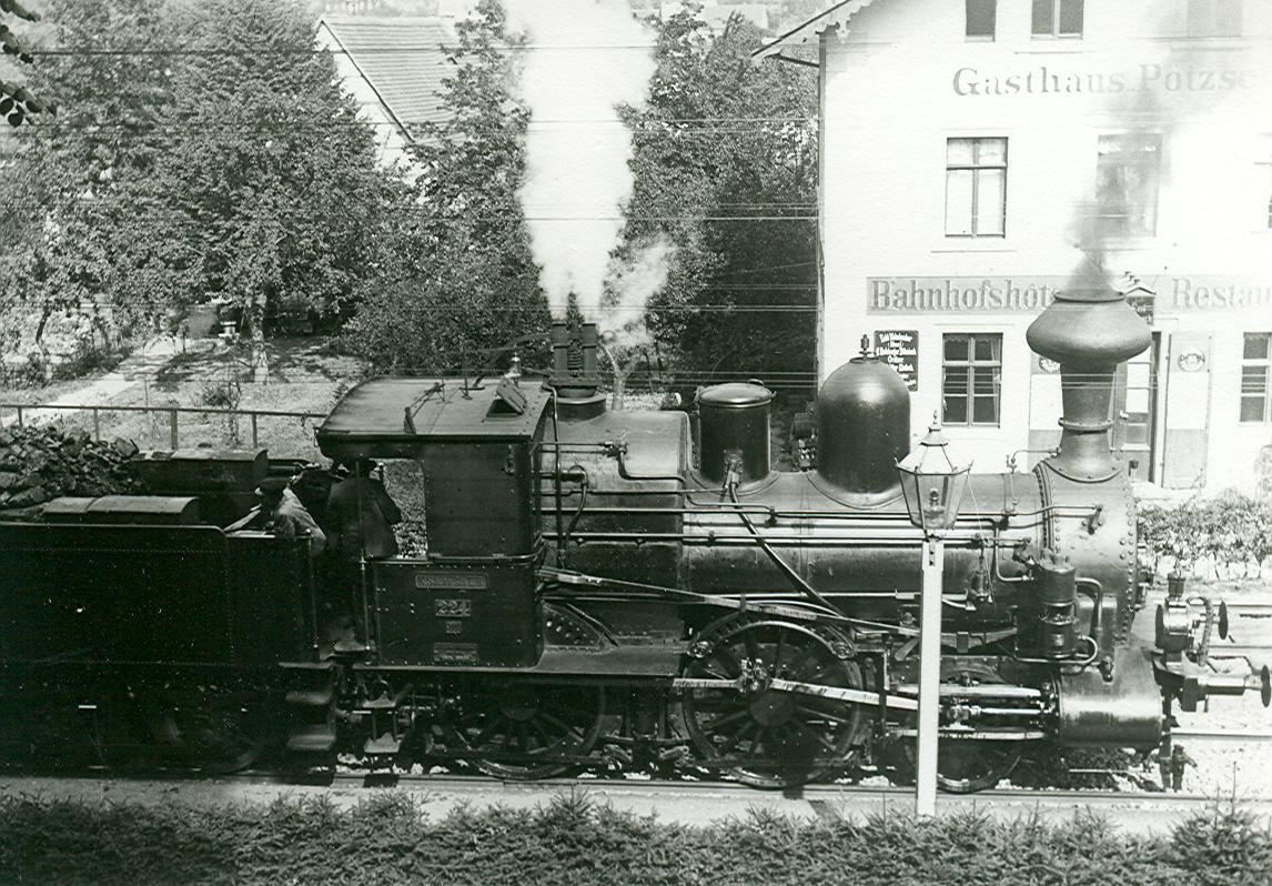 Dampflokomotive Sächsische IIIb in Pötzscha.